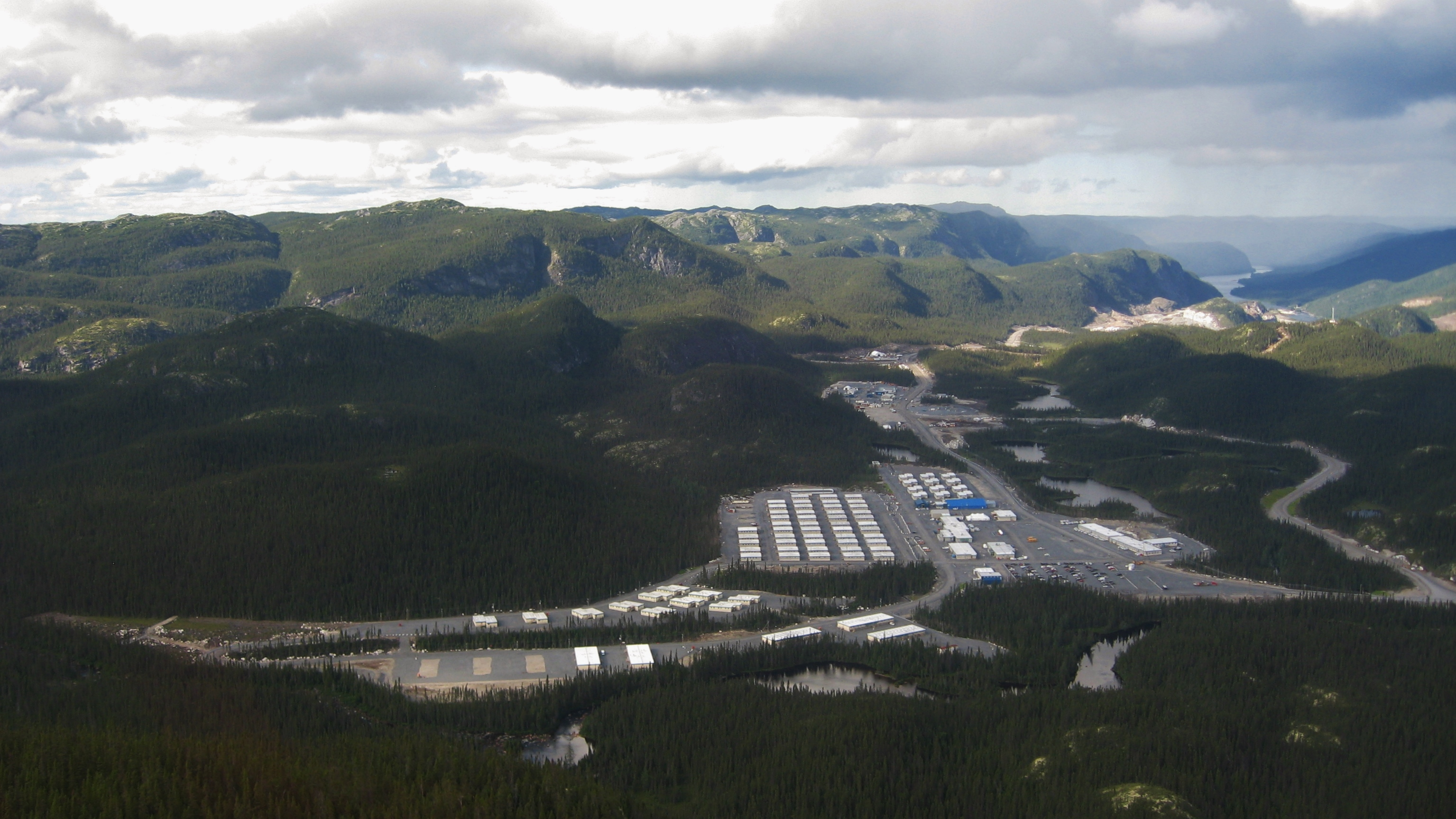 Campement du Mista, complexe hydroélectrique de la Romaine (Romaine-3).